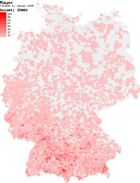 Verteilung des Nachnamens Mayer in Deutschland nach dem Telefonbuch mit Stand vom 6. Januar 2005 Source: selbst erstellt Ersteller: W. Baumgartner